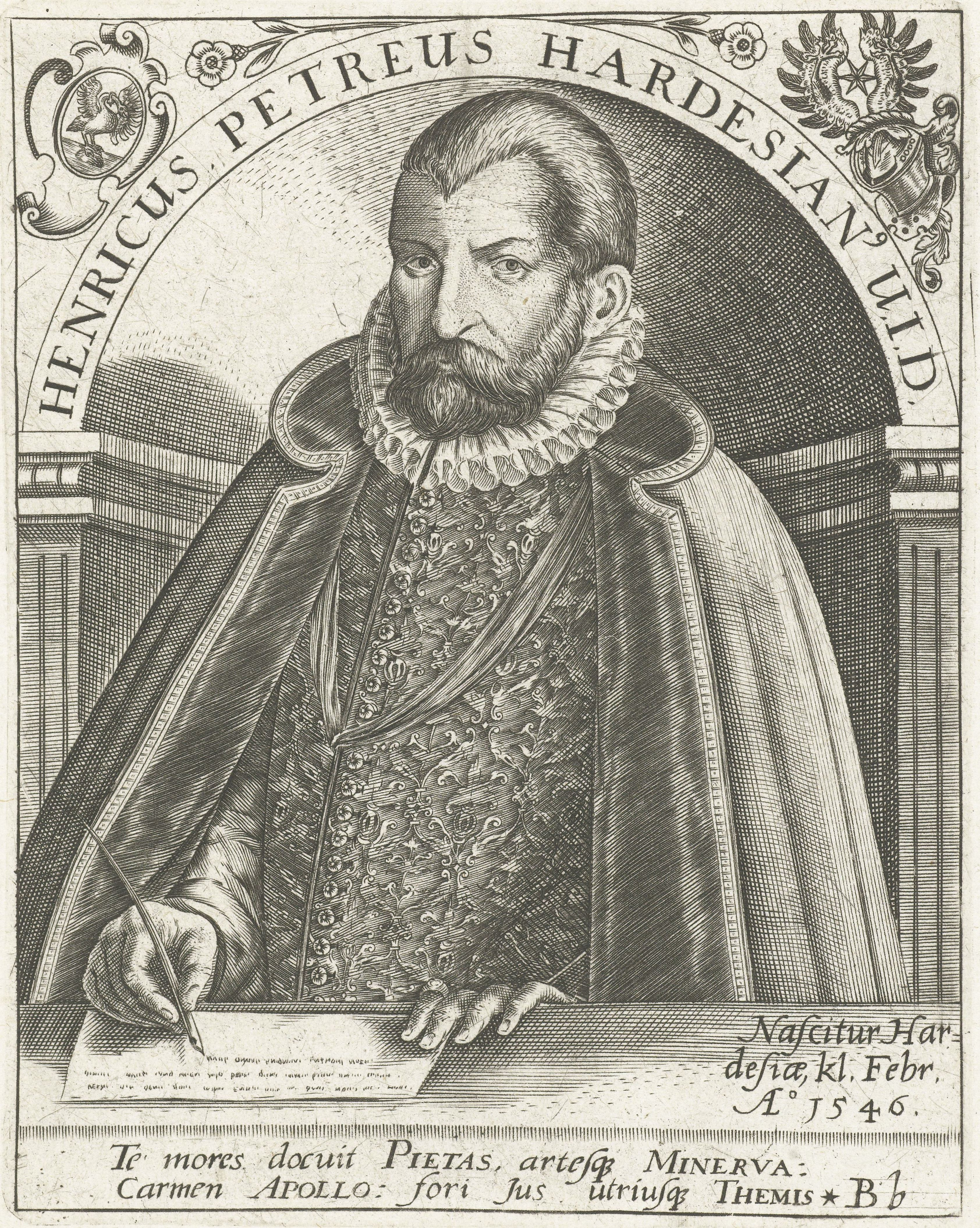 IdentificatieTitel(s): Portret van Heinrich PetreusHenricus Petreus Hardesianus (titel op object)Objecttype: prent boekillustratie Objectnummer: RP-P-OB-31.466Omschrijving: Portret van de jurist Heinrich Petreus, in een nis, schrijvend aan een tafel. Onder het portret een Latijns vers op Petreus.VervaardigingVervaardiger: prentmaker: Theodor de Bryprentmaker: Johann Theodor de Brynaar ontwerp van: Jean Jacques Boissard (mogelijk)Plaats vervaardiging: Frankfurt am MainDatering: ca. 1597 - ca. 1599 en/of 1669Fysieke kenmerken: gravureMateriaal: papier Techniek: graveren (drukprocedé)Afmetingen: plaatrand: h 140 mm × b 100 mmToelichtingGemaakt voor: J.J. Boissard, Icones virorum illustrium doctrina &c eruditione praestanti um contines. Frankfurt am Main: de Bry, 1597-1599. Opnieuw gebruikt in: J.J.Boissard, Bibliotheca chalcographica, hoc est Virtute et eruditione clarorum Virorum Imagines. Heidelberg: Clemens Ammon, 1669 (te herkennen aan de toegevoegde signatuur in de rechter onderhoek: 2B).Verwerving en rechtenVerwerving: onbekendCopyright: Publiek domein